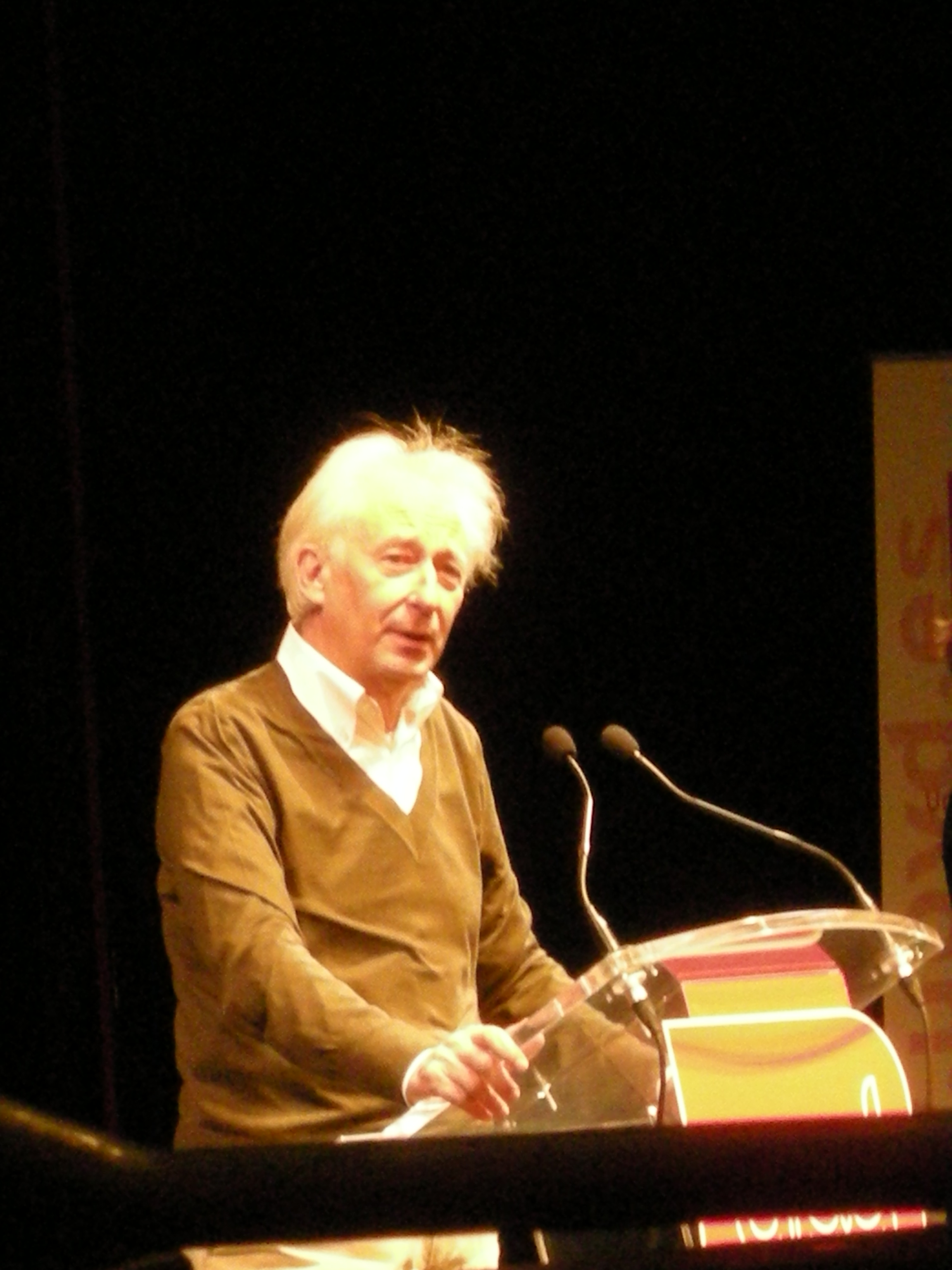 Albert Boadella. Acto de I Aniversario de UPyD. Madrid, España.